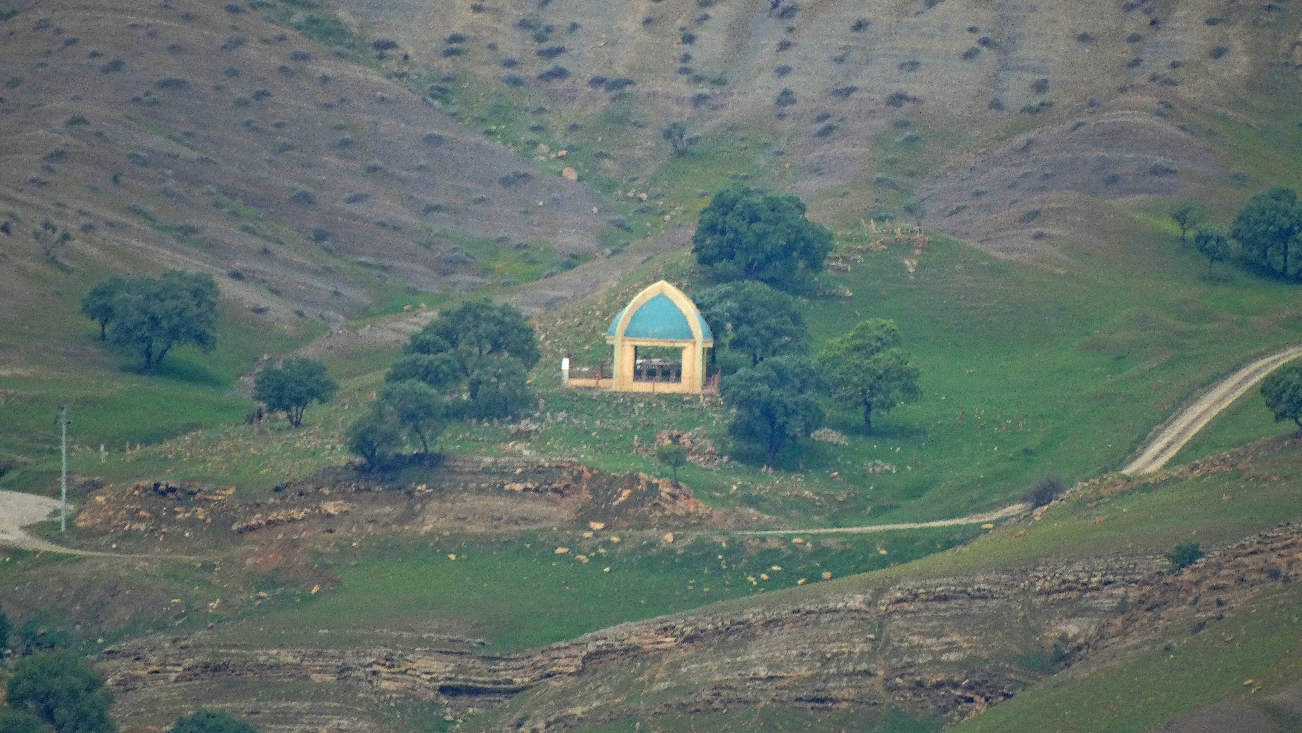 آرامگاه شاعر و عارف مولوی کرد، در روستای سرشاته و در نزدیکی شهر حلبچه از توابع استان حلبچه و در چند کیلومتری روستاهای کانی‌سالار، کلور از توابع شهرستان جوانرود استان کرمانشاه و در نزدیکی لبه رود زمکان، لیله و سیروان در مرز ایران و عراق (مکان ثبت نگاره: نقطه صفر مرزی، منطقه لاوران و کانی‌چنار در چند کیلومتری روستای کلور در شهرستان جوانرود از توابع استان کرمانشاه، ایران).